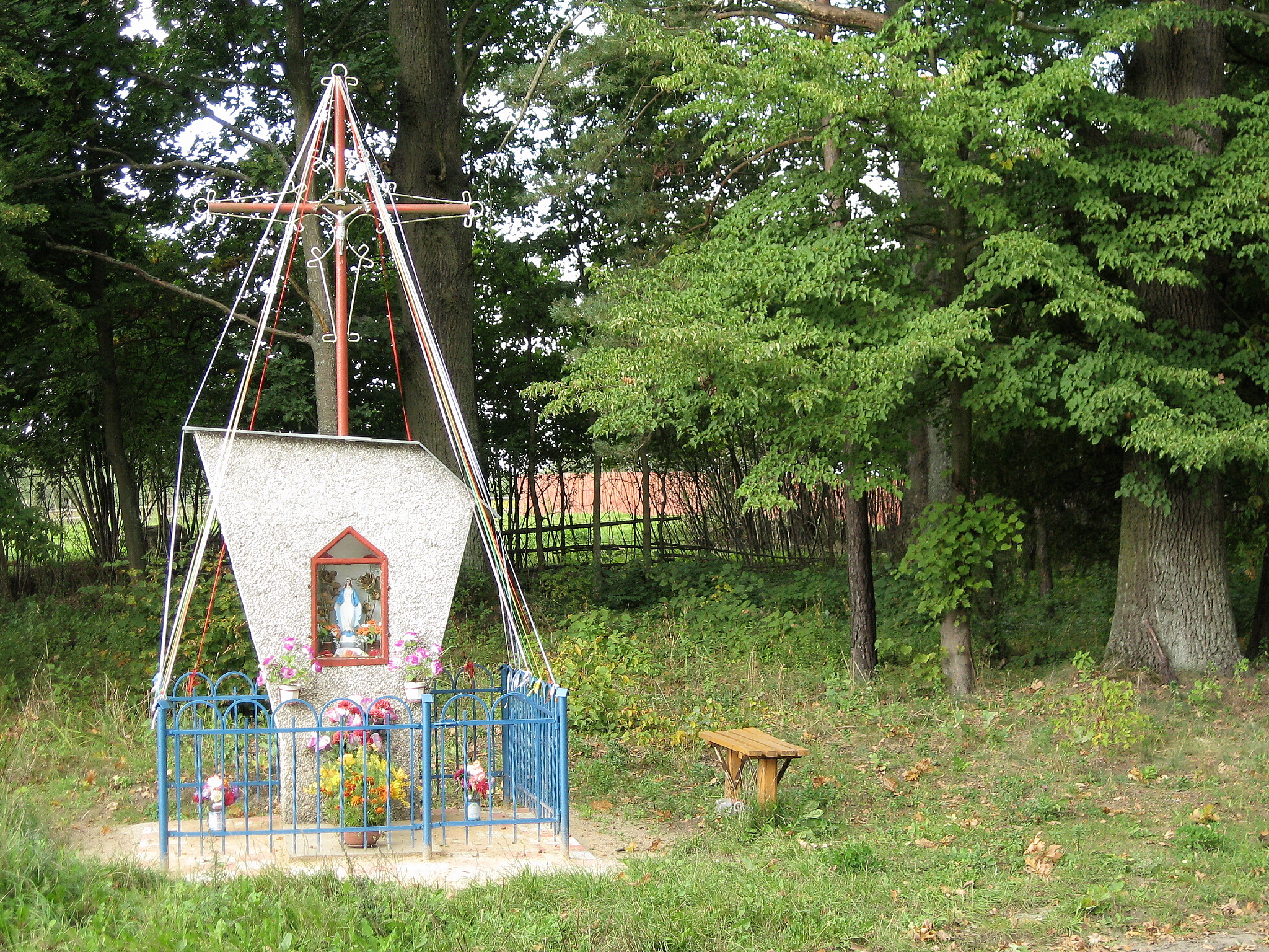 Kapliczka w miejscowości Siódmak (powiat Szczytno)